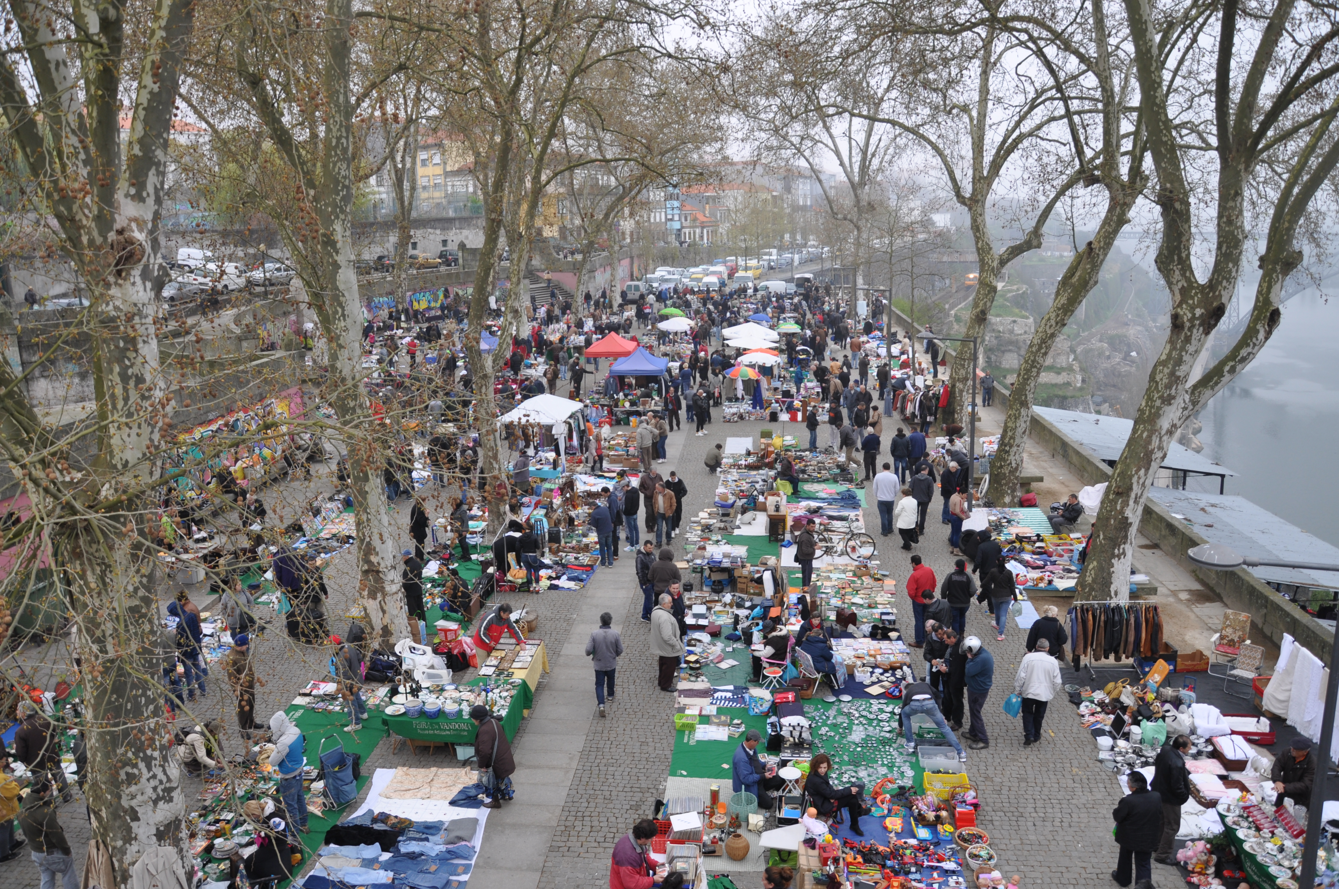 DSC_0016. Alameda das Fontaínhas